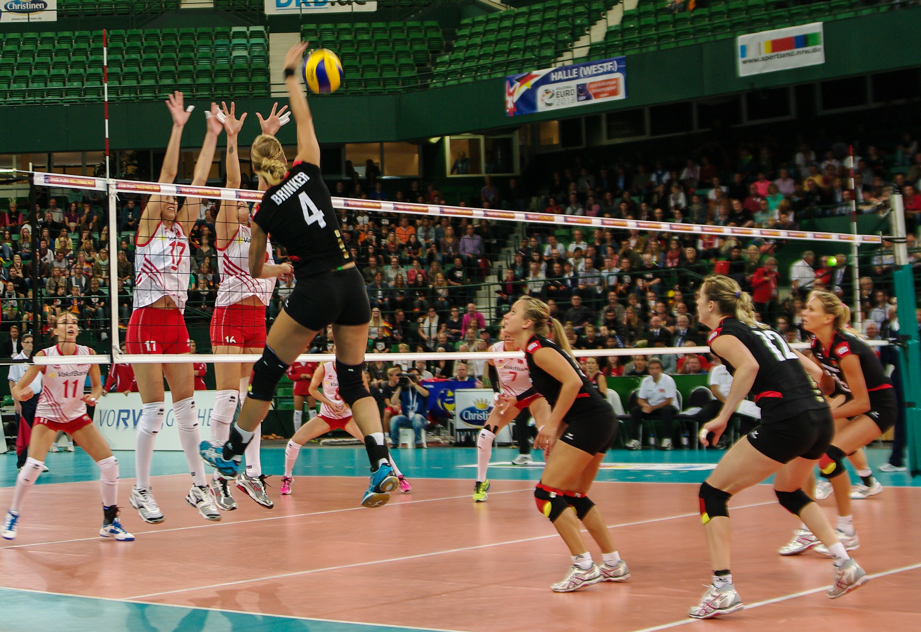 Volleyball-Europameisterschaft der Frauen 2013-Spielort Halle (Westf) Gerry-Weber-Stadion